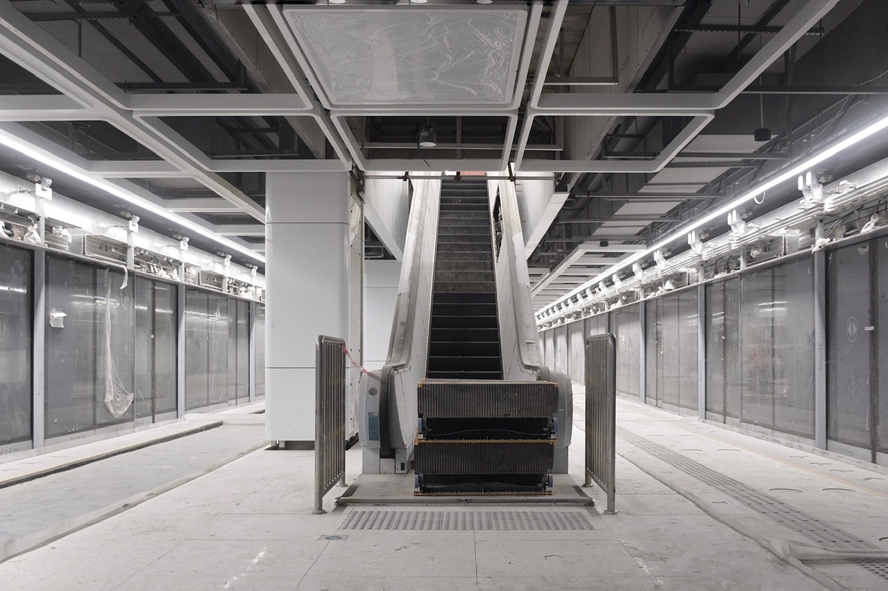 冬瓜岭站站台